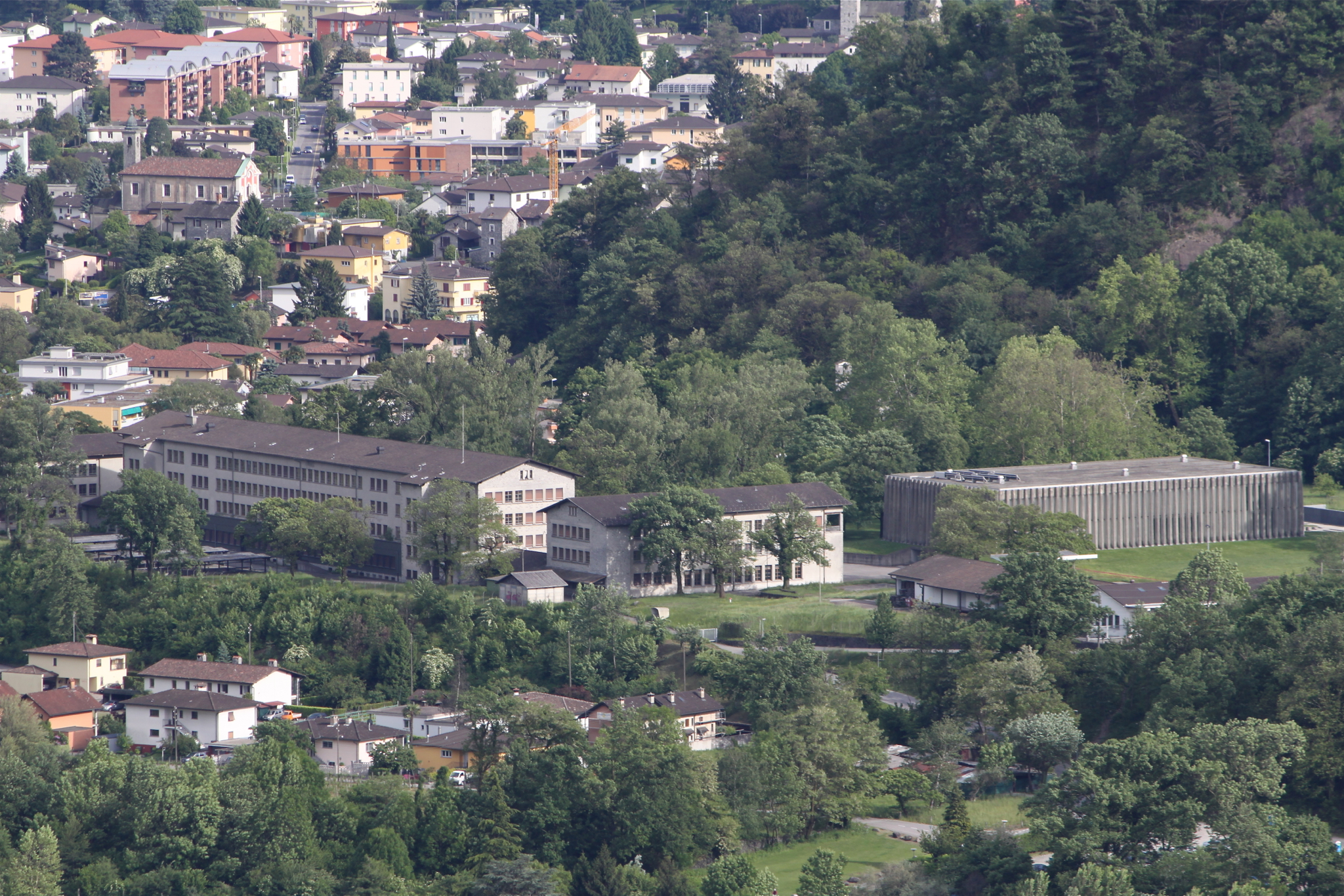 Ex-caserma S. Giorgio a Losone.